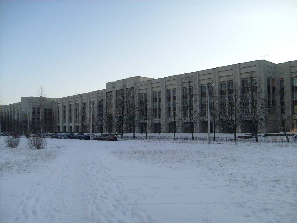 Математико-механический факультет СПбГУ